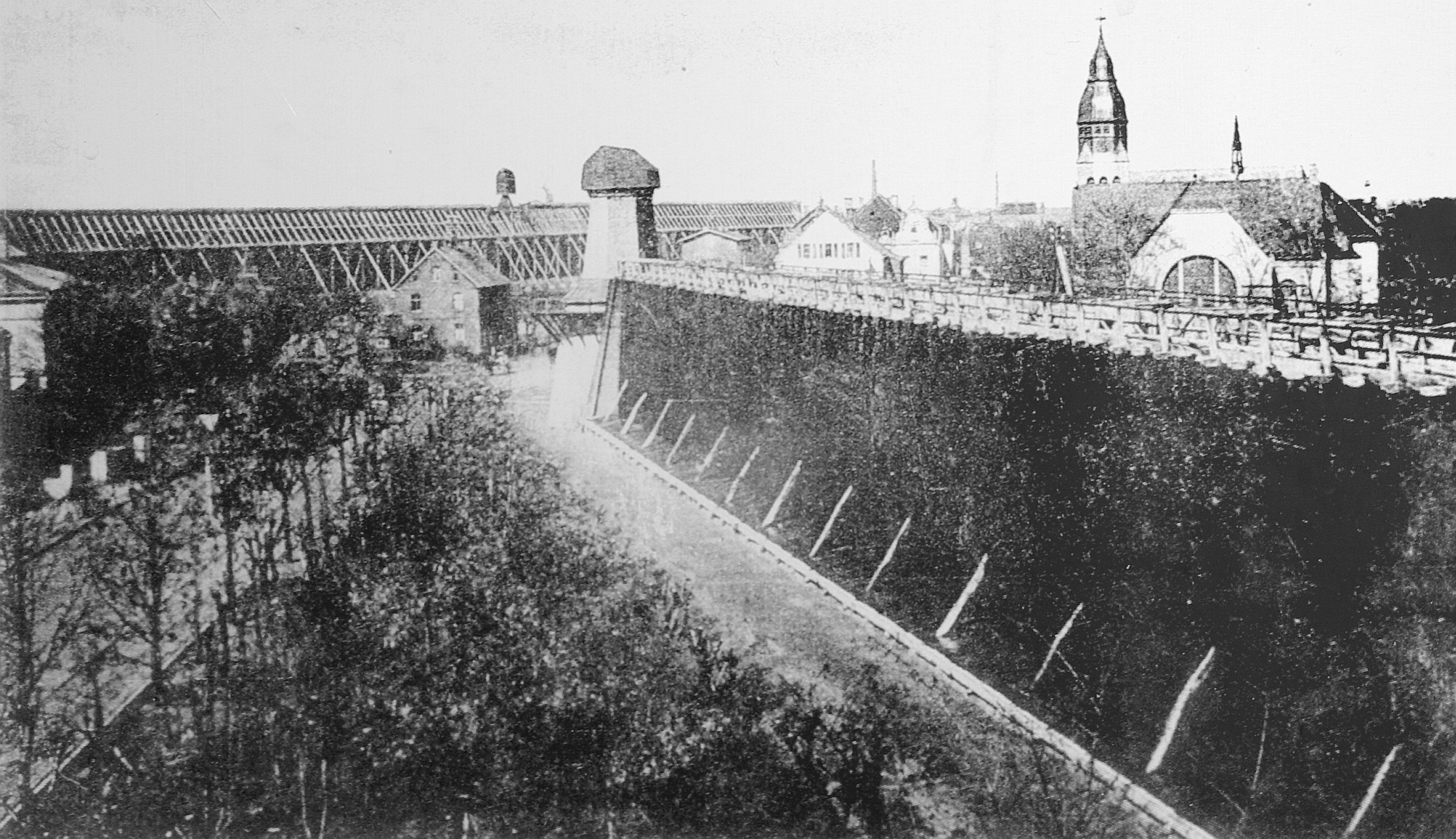 Unna, Gradierwerke Saline Königsborn (Unna), in der Mitte die ehem. Windpumpe, 1750 über dem 1747 gebohrten Solebrunnen errichtet, rechts die Christuskirche. Foto etwa 1910